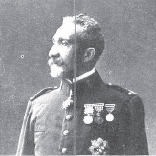 Fotografía del general español Felipe Alfau Mendoza publicada en 1913 con motivo de la ocupación de Tetuán por las tropas a su mando